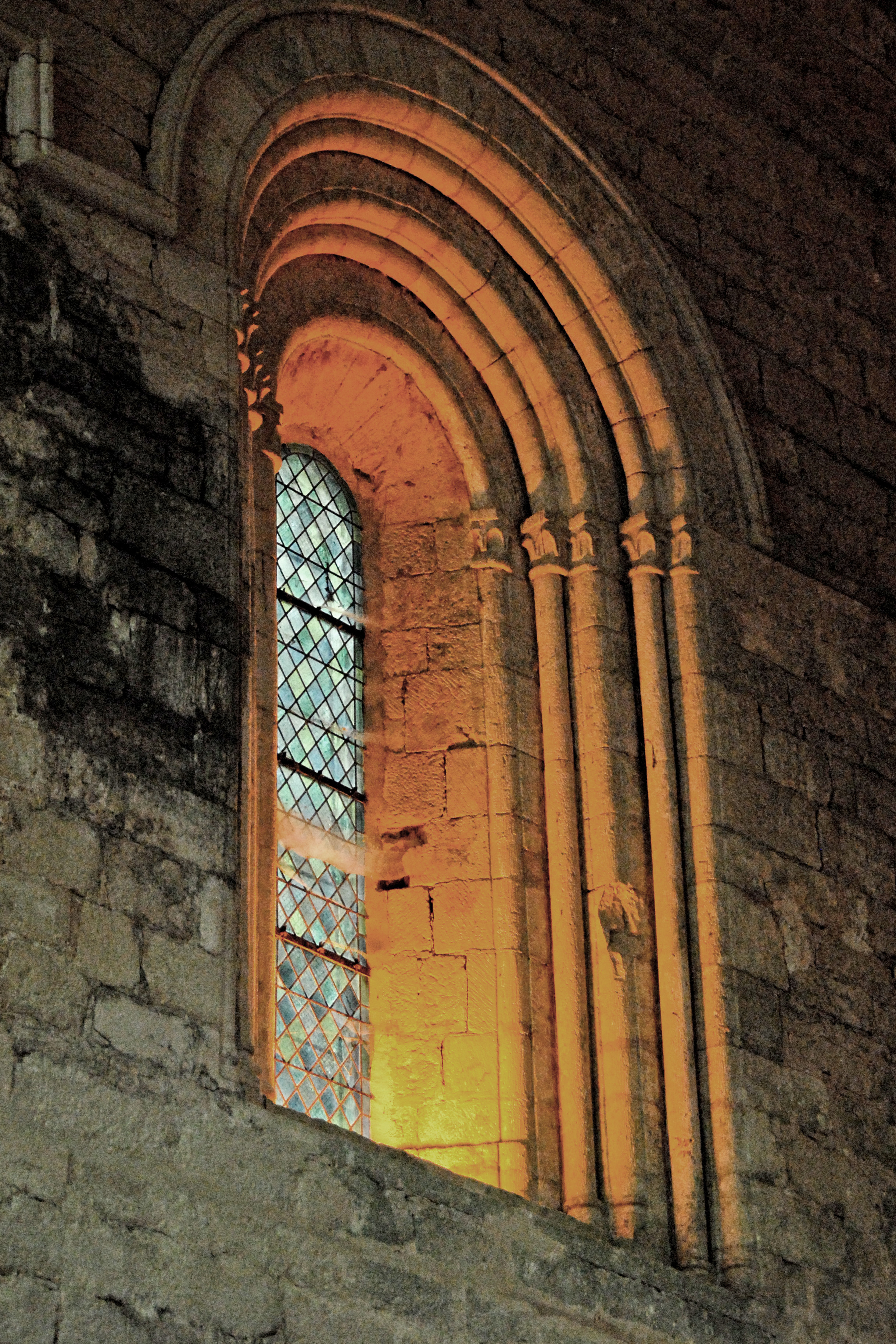 Saint-Amand-de-Coly, großes Fenster in Westwand